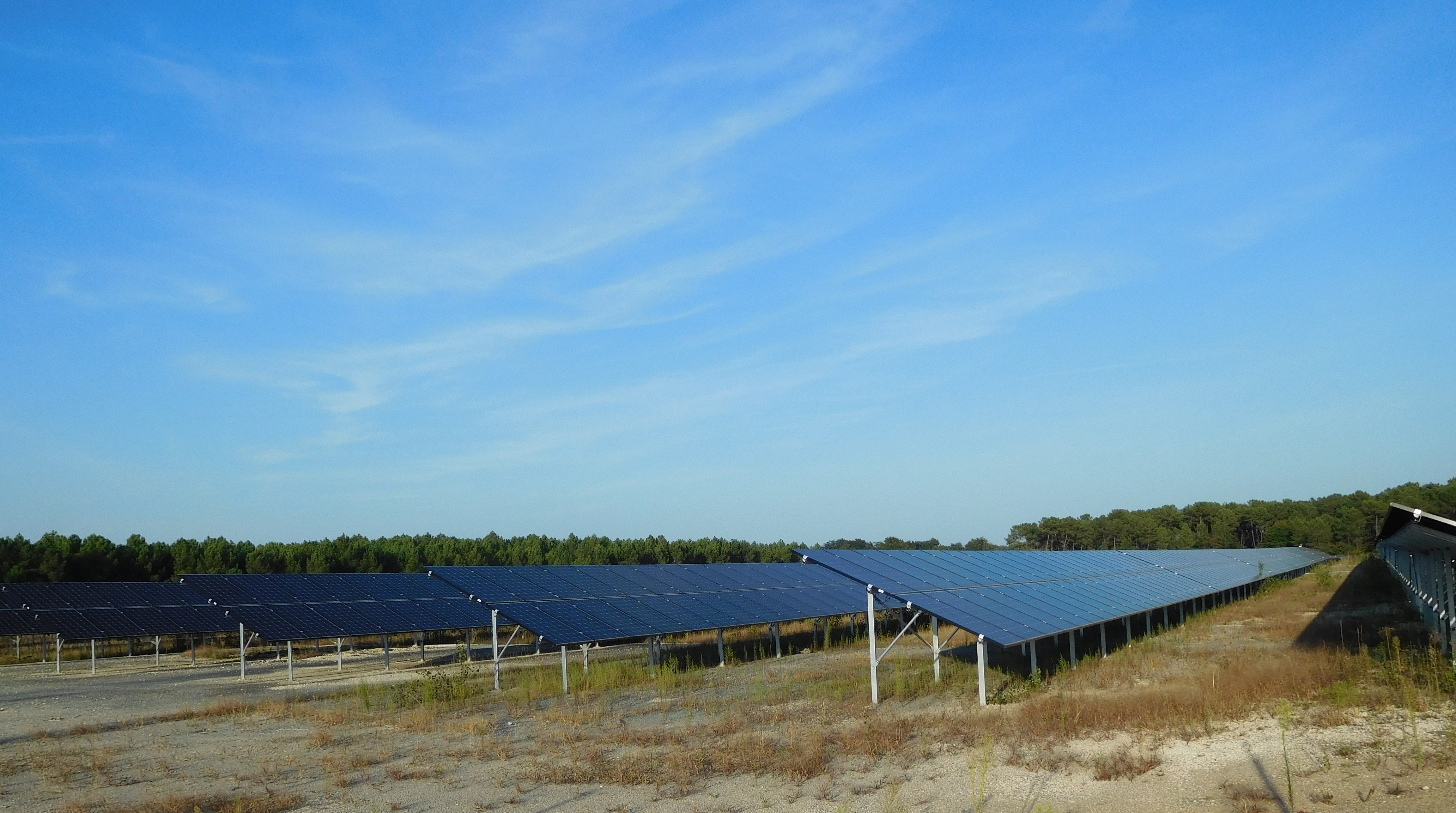 Centrale solaire, panneaux fixes et plats ; lieu-dit La Croix (près de l'A89), Beaupouyet (Dordogne, France).